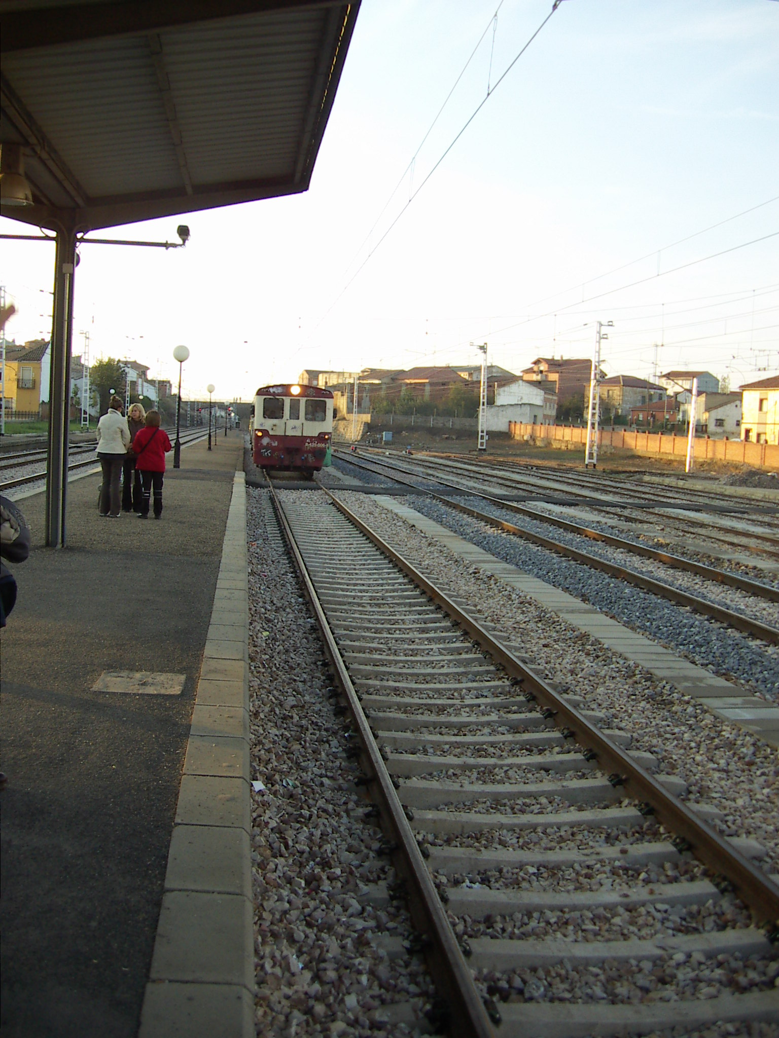 Renfe Serie 439